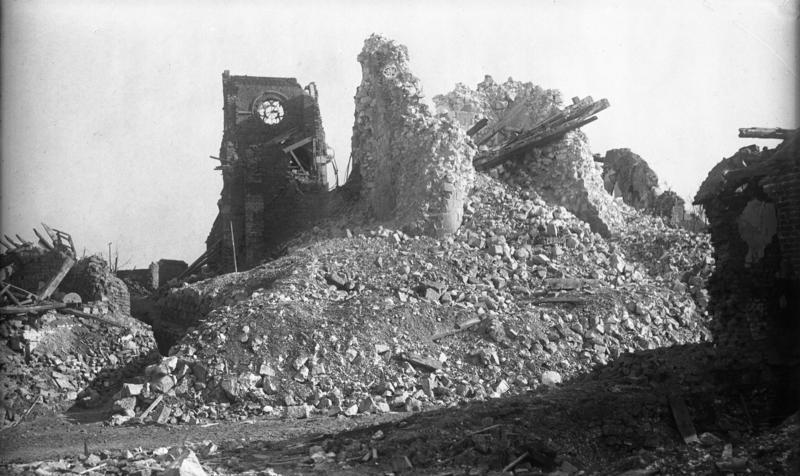 Graincourt die zerschossene Kirche Febr. 1918